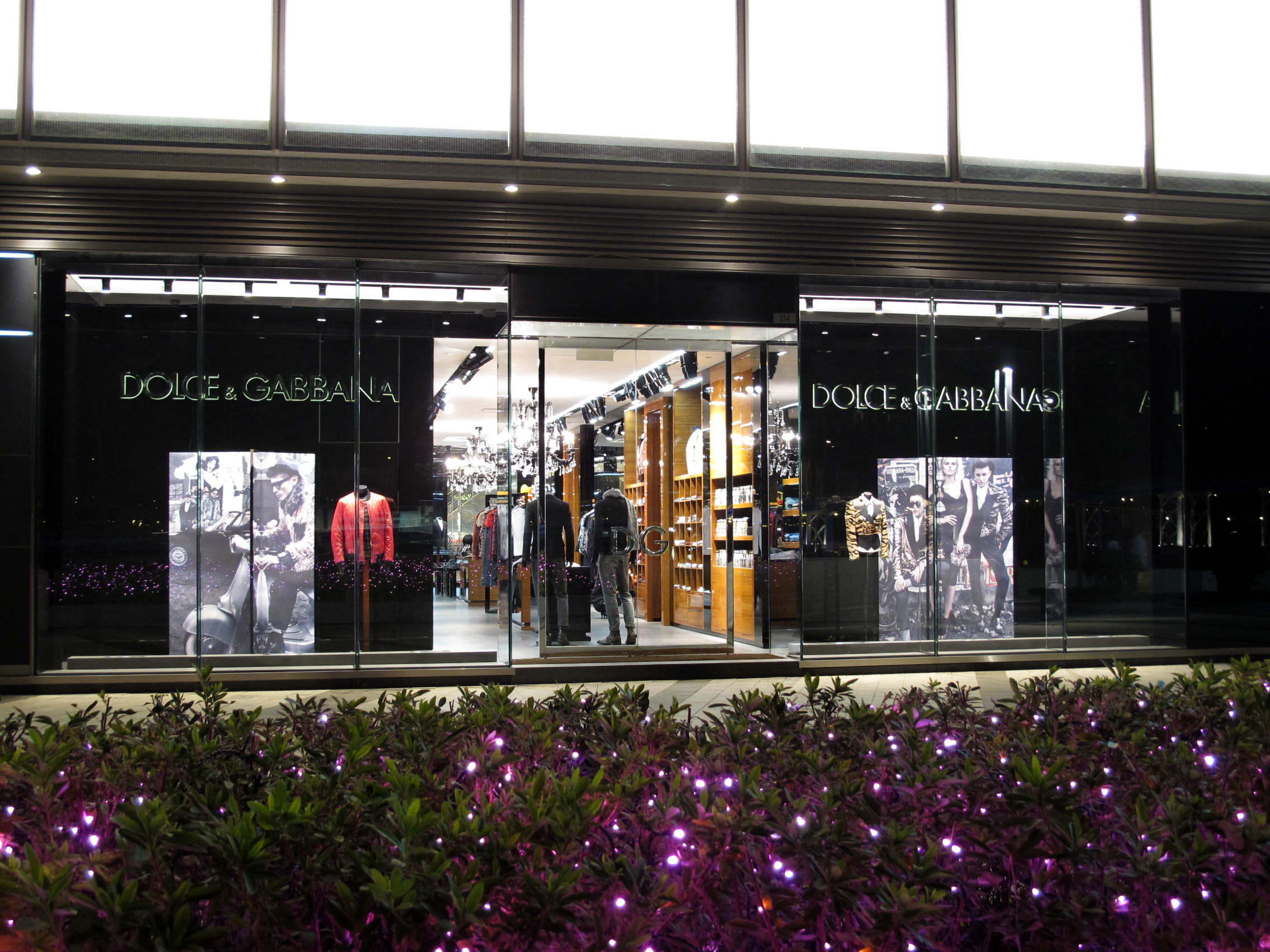 Dolce & Gabbana in Macau One Central Plaza Dolce & Gabbana位於澳門壹號廣場分店